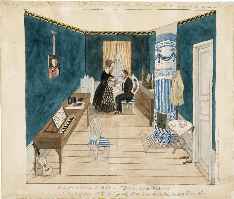 Mitt rum hos Mamsell Wallerqvist, på nedra botten, uti huset N:ro 13 vid Tavastgatan, Qv. Ugglan mindre Josabeths tredje bostad 1842 till 1846. Herr Ferdinand Tollin på besök. Han bjuds på kaffe med dopp. Besökarens svarta hatt och handskar ligger på klavikorden med de svarta tangenterna. Hans galoscher och käpp står uppställda vid dörren.